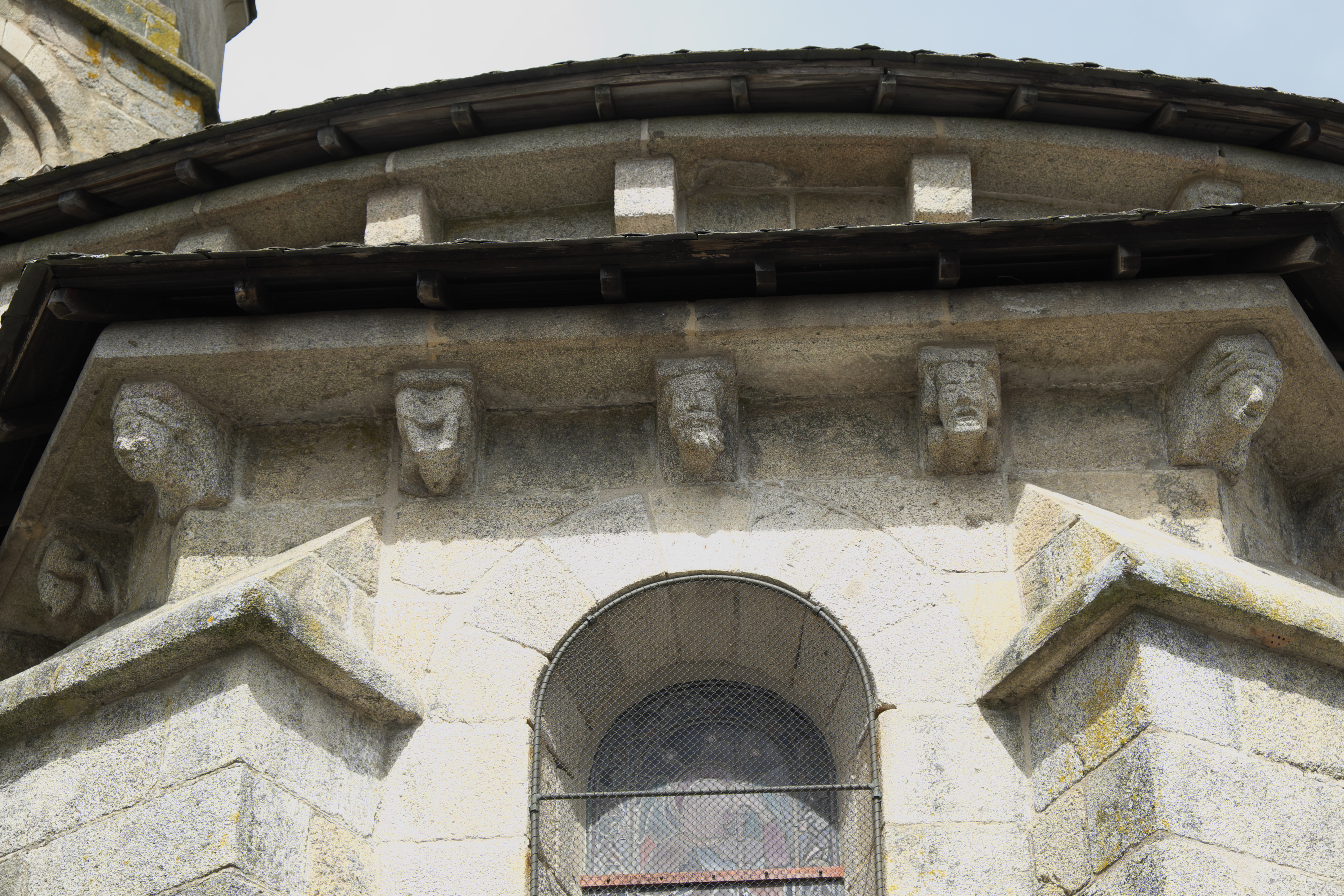 Abteikirche Saint-Barthélémy in Bénévent-l’Abbaye im Département Creuse (Nouvelle-Aquitaine/Frankreich), Kragsteine